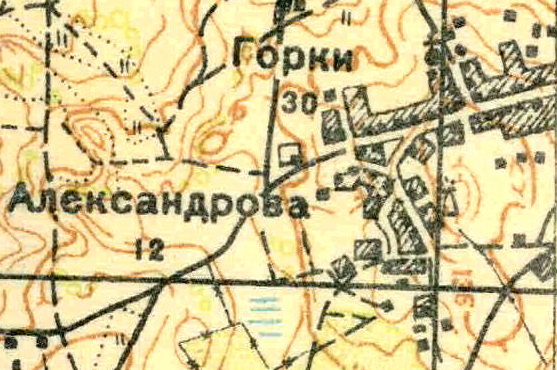 Топографическая карта Ленинградской области, квадрат О-35-9-Г-б (Вистина), деревня Горки